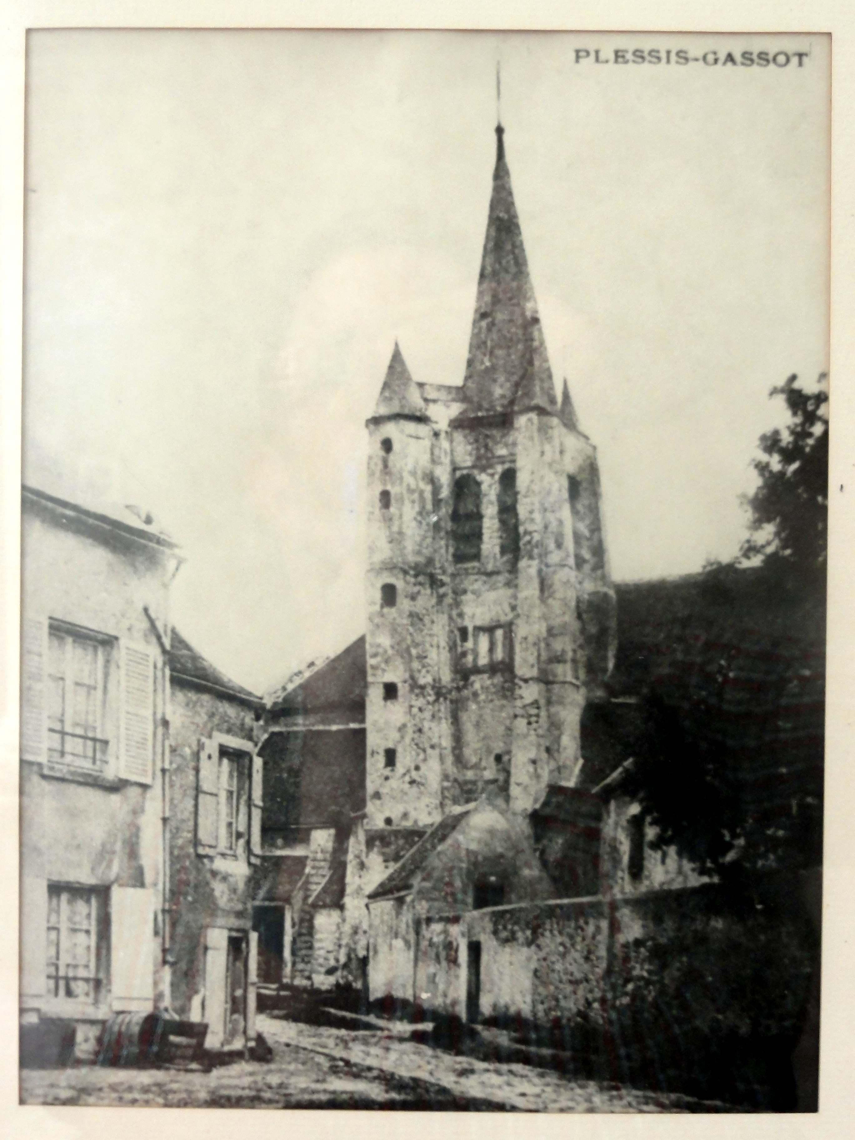 Vue à la fin du XIXe siècle avant la démolition partielle du clocher en 1899.